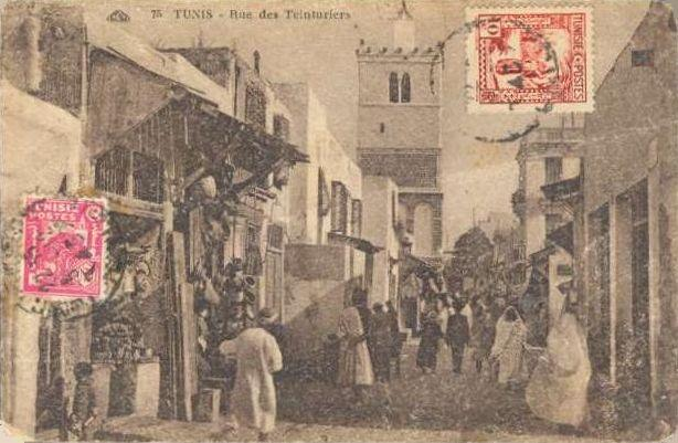 Rue des teinturiers à la Médina de Tunis, avant 1940, Tunis, Tunisie